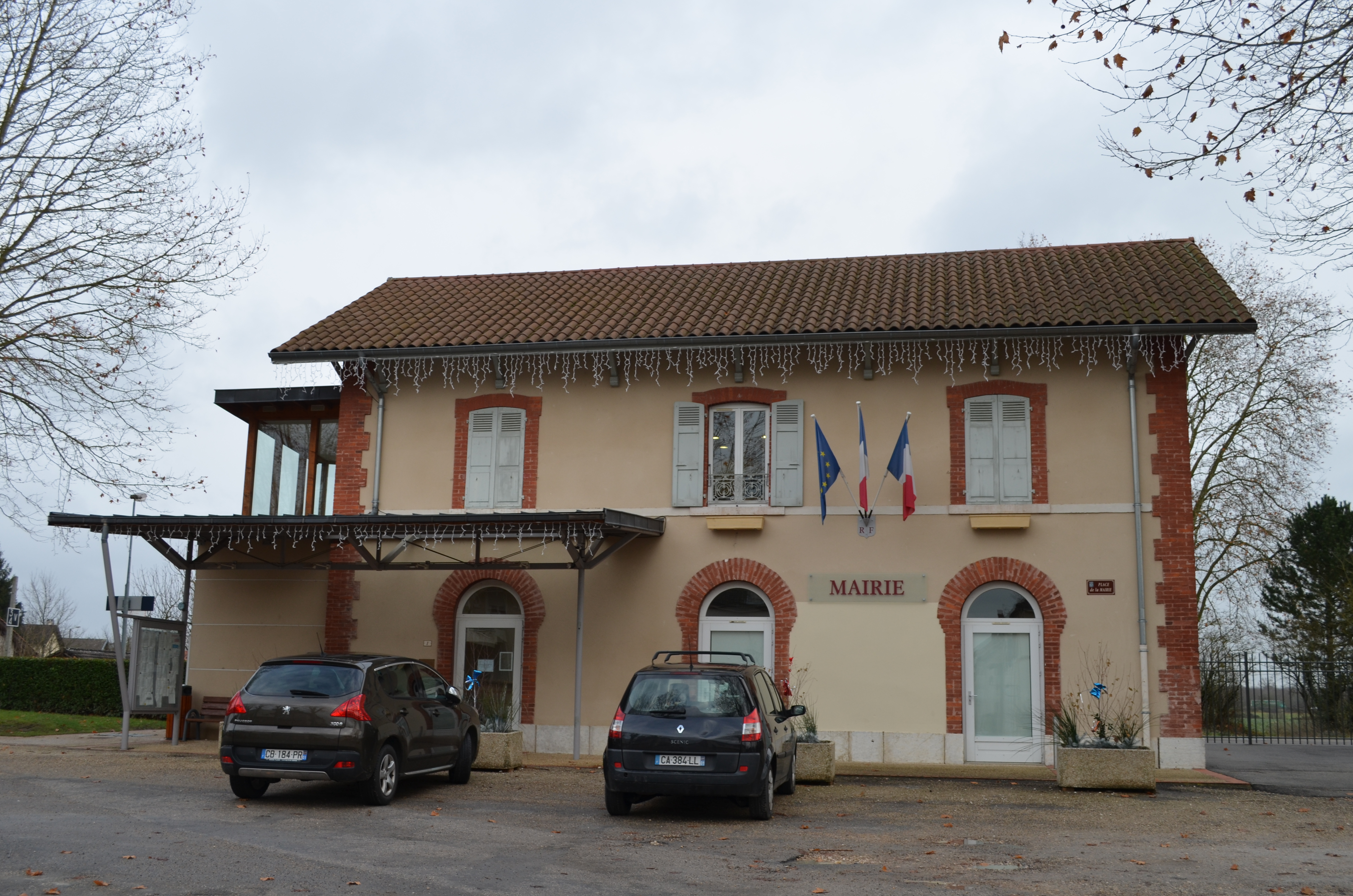 Mairie de Marlieux installée dans ce qui était la gare.